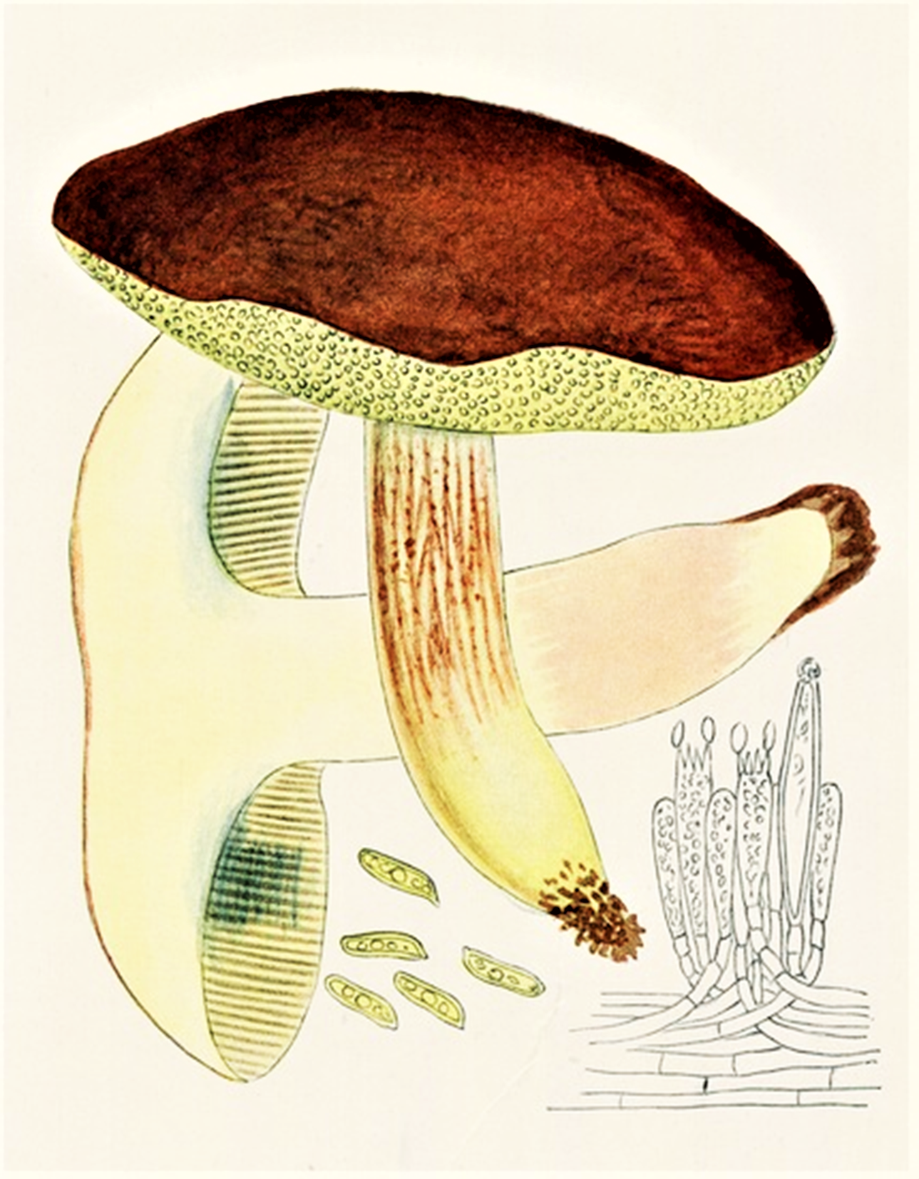 Giacomo Bresadola: Boletus ferrugineus Schaeff. (1762), Syn. Xerocomus spadiceus (Schaeff.) Quél. (1888), Xerocomus ferrugineus (Schaeff.) Alessio (1888)